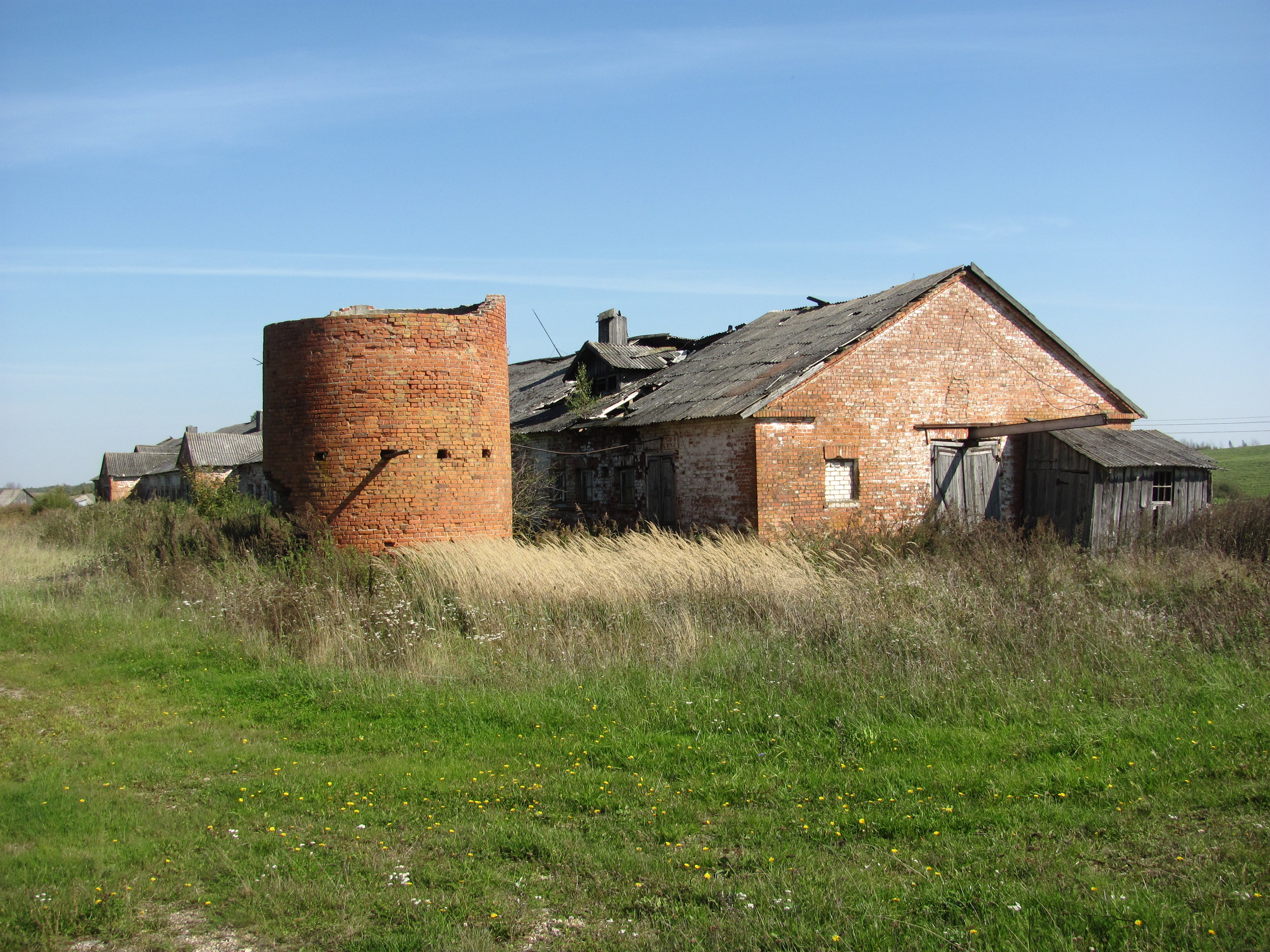 Zarasų sen., Lithuania